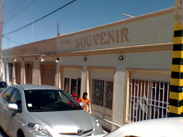 Xhuquicamat el dia de su despedida